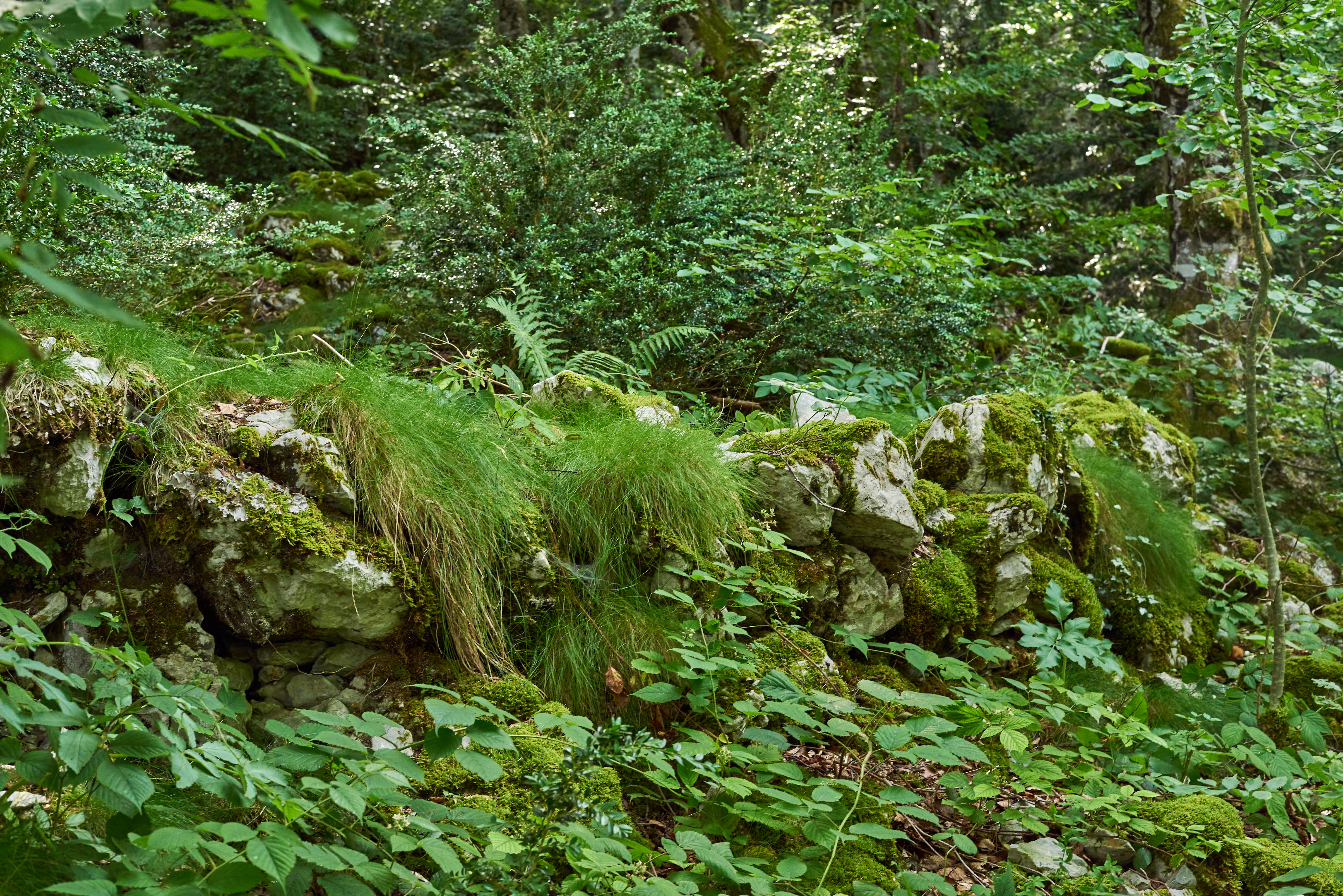 Restes de la barbacana de l'est